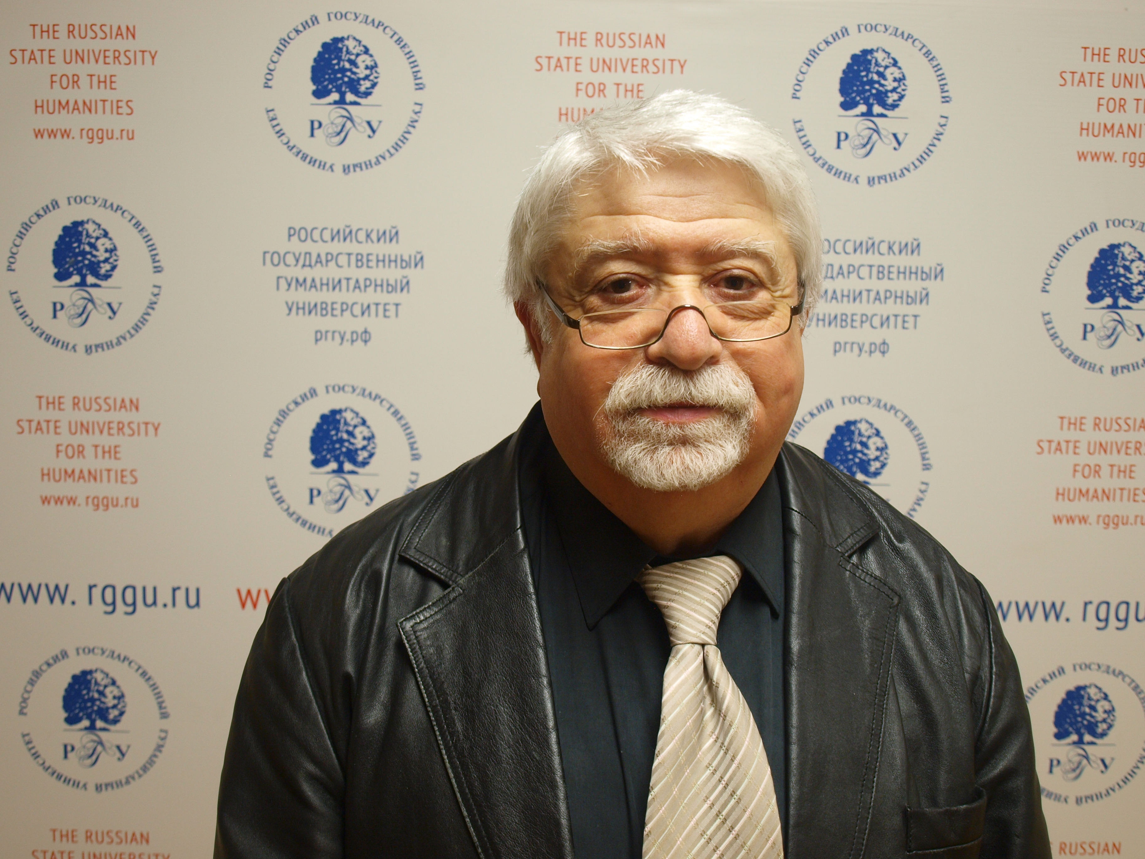 Профессор Б. Л. Хавкин. РГГУ.